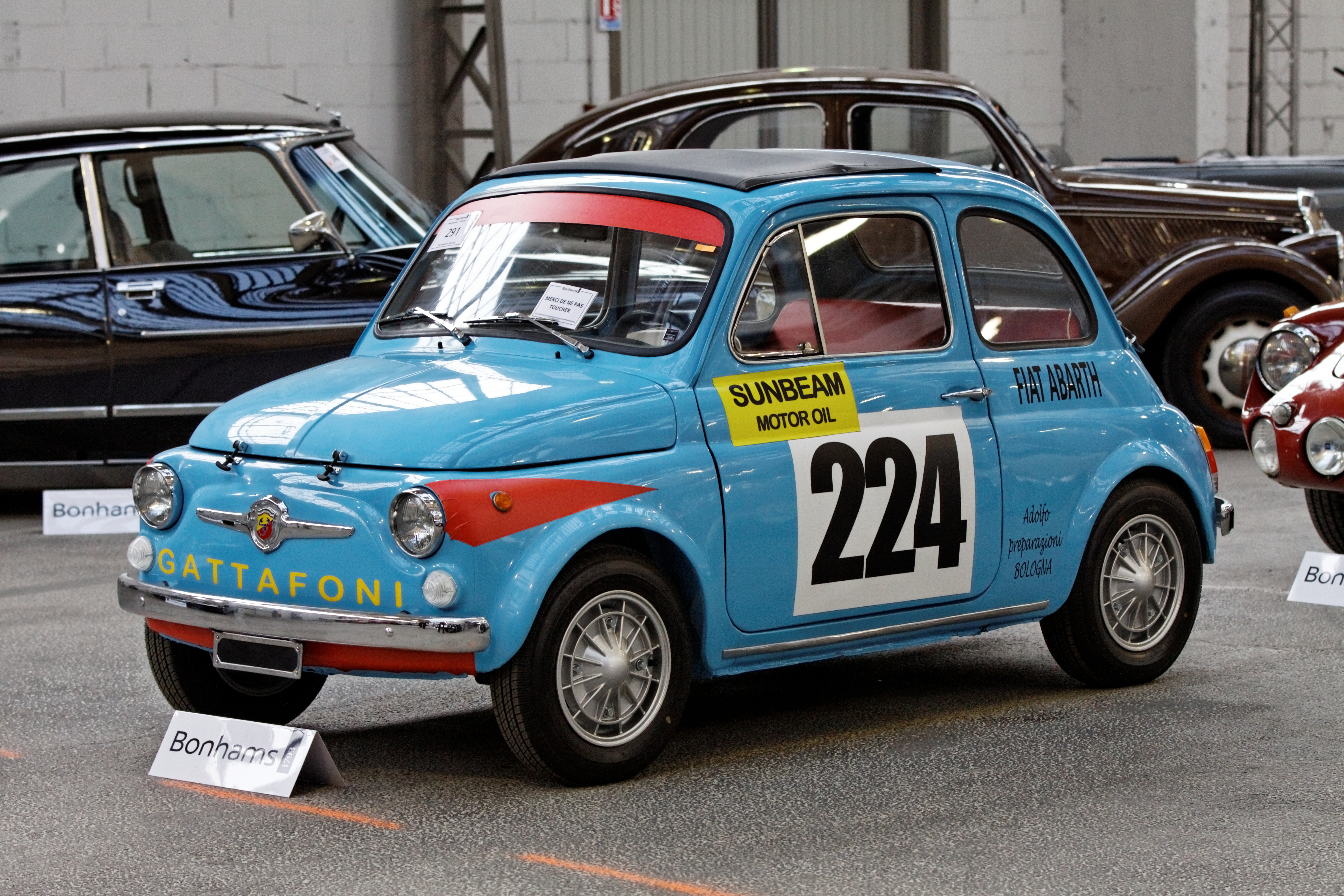 FIAT-Abarth 595 Saloon